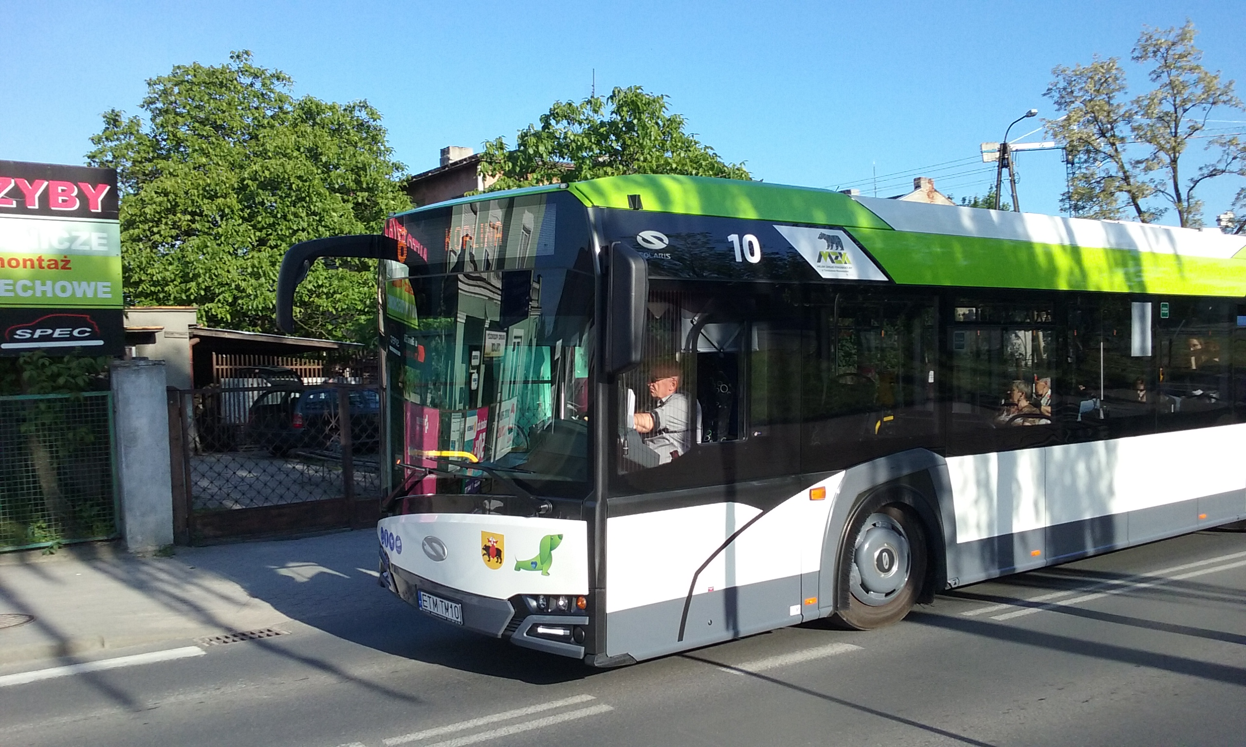 Autosbus Solaris Urbino 12 Hybrid jeden z dwudziestu pięciu zakupionych przez PiS dla MZK w Tomaszowie Mazowieckim